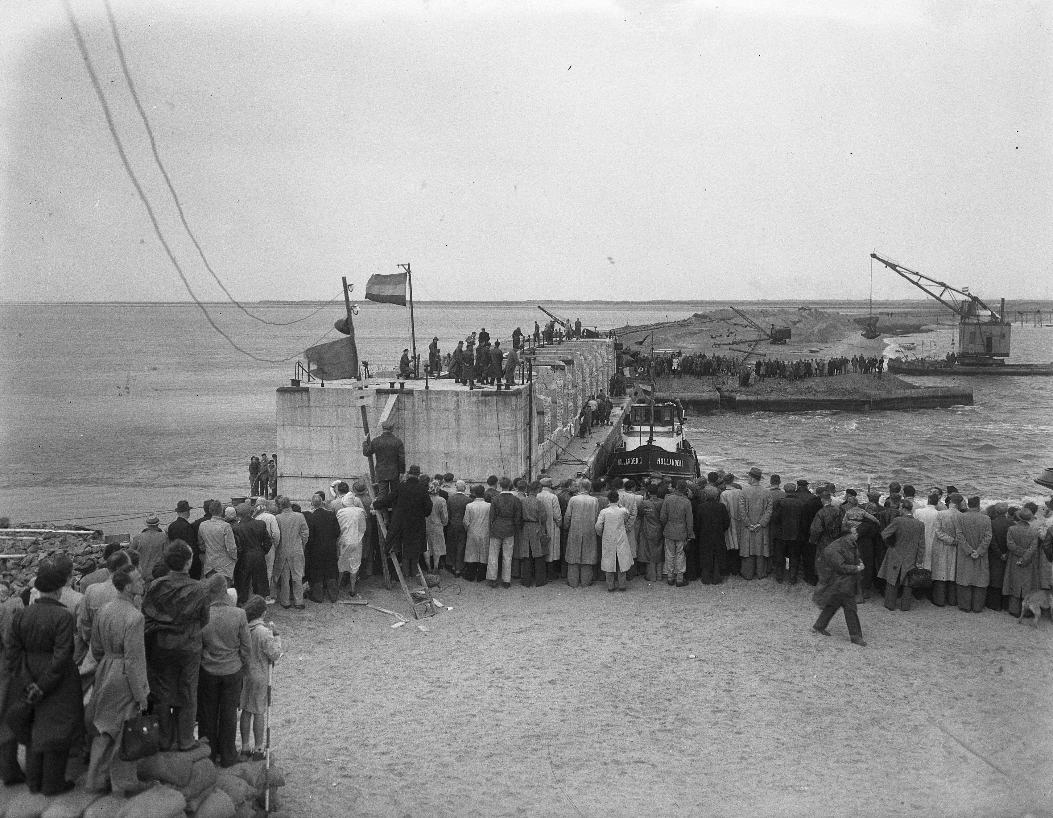 Collectie / Archief : Fotocollectie Anefo Reportage / Serie : [ onbekend ] Beschrijving : Brielse Maas tussen Voorne en Roozenburg bij Oostvoorne afgesloten Datum : 3 juli 1950 Locatie : Brielse Maas, Roozenburg, Voorne, Zuid-Holland Trefwoorden : afsluitingen, rivieren Fotograaf : Winterbergen, […] / Anefo Auteursrechthebbende : Nationaal Archief Materiaalsoort : Glasnegatief Nummer archiefinventaris : bekijk toegang 2.24.01.09 Bestanddeelnummer : 904-0584